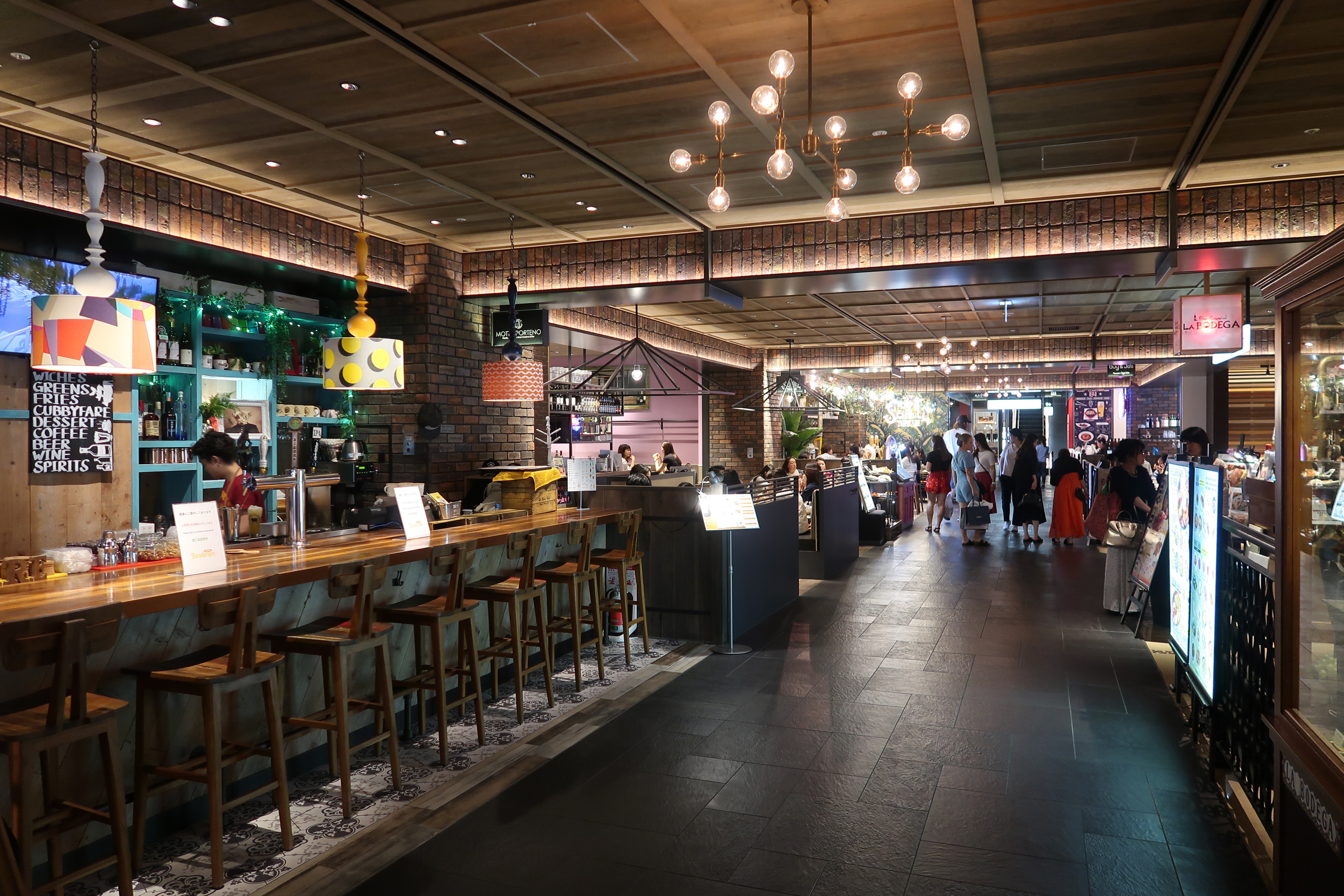 Tokyu Plaza Ginza Level 10 Restaurants